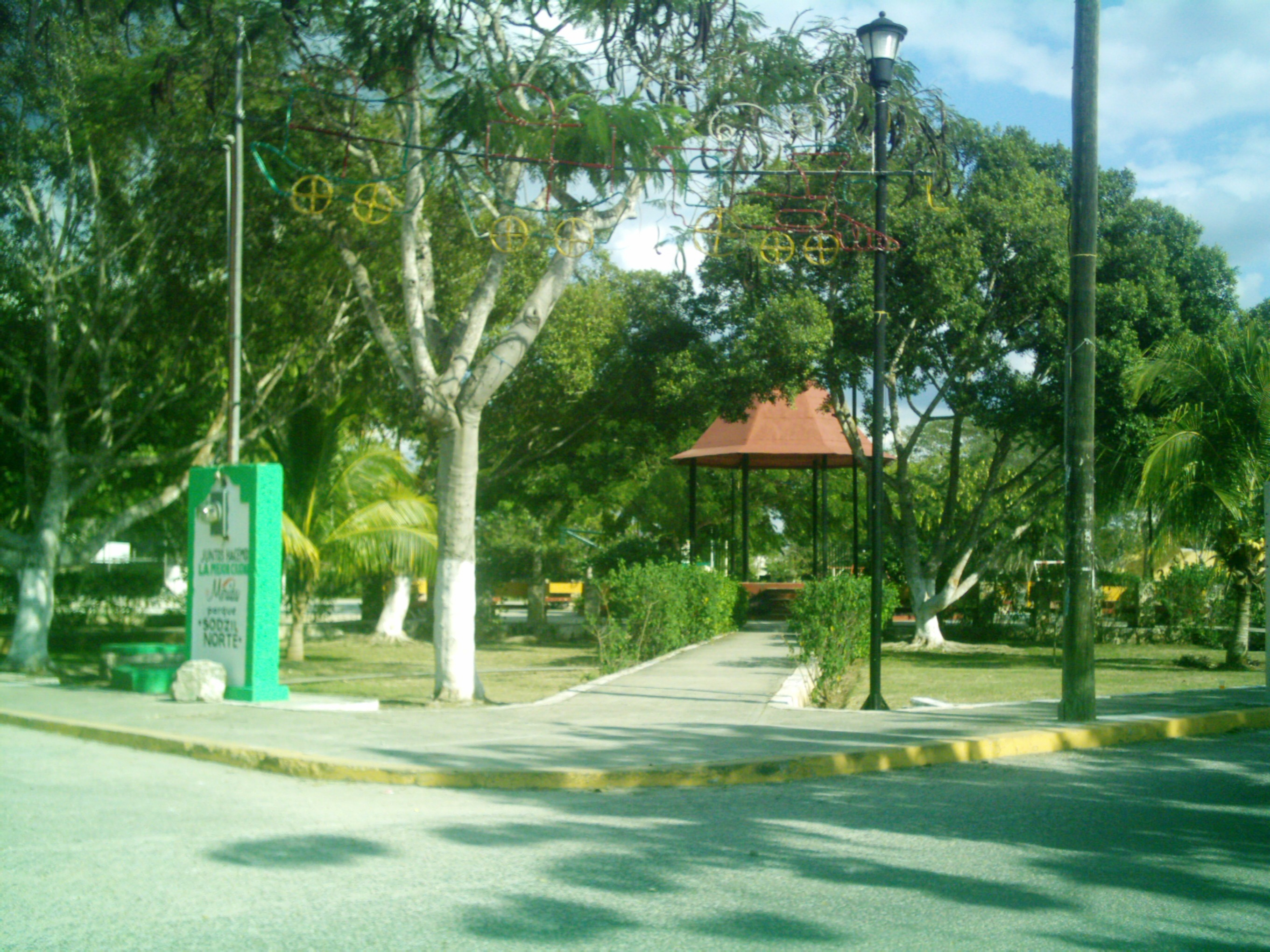 Parque de Sodzil Norte, Yucatán.